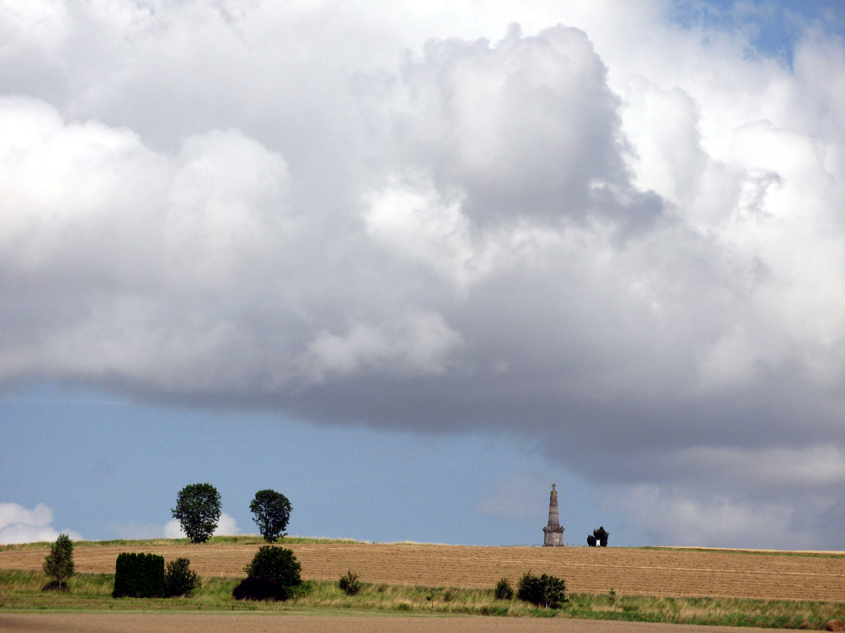 Pont-Noyelles (Somme, France) - La Colonne Faidherbe.